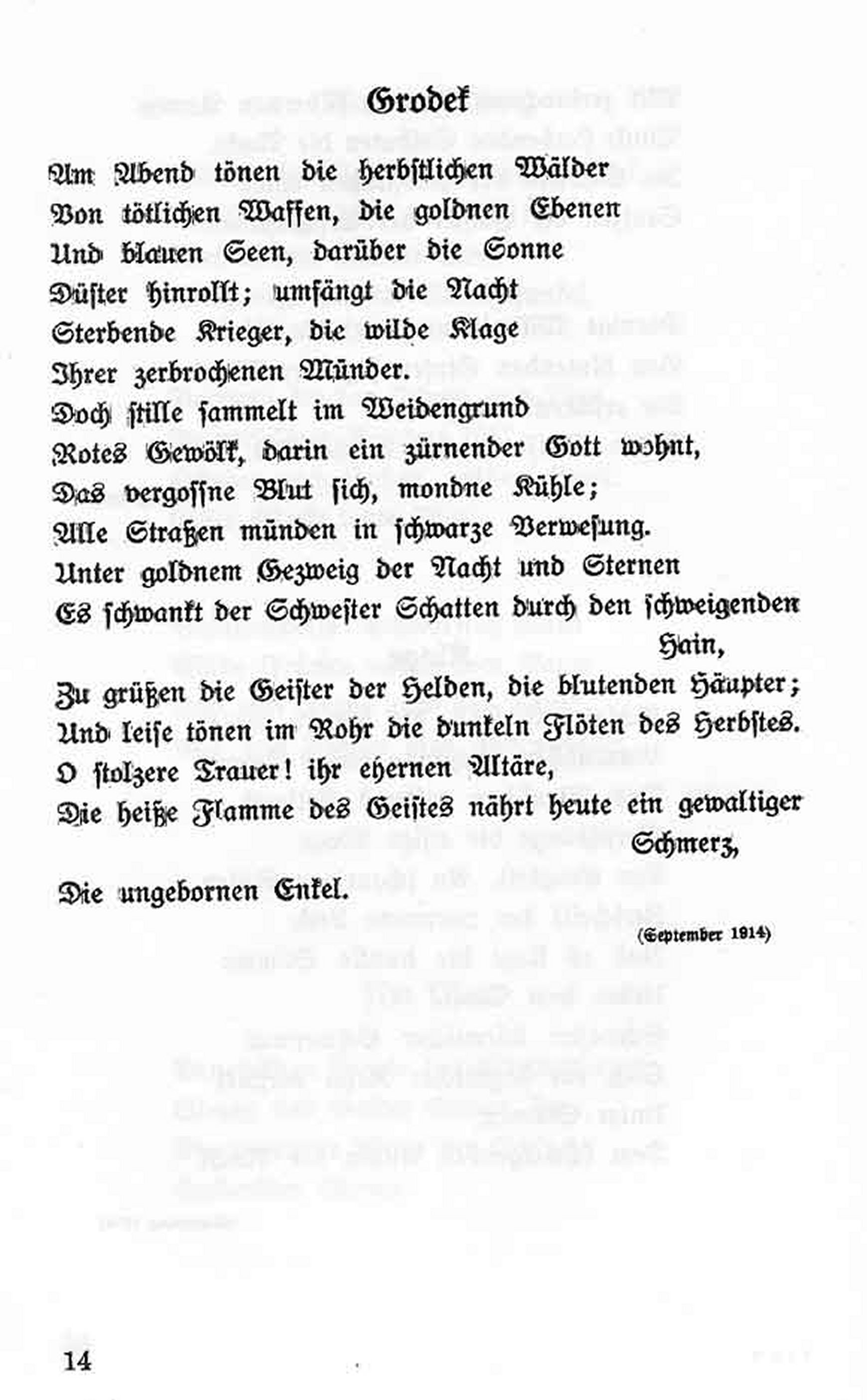 Grodek